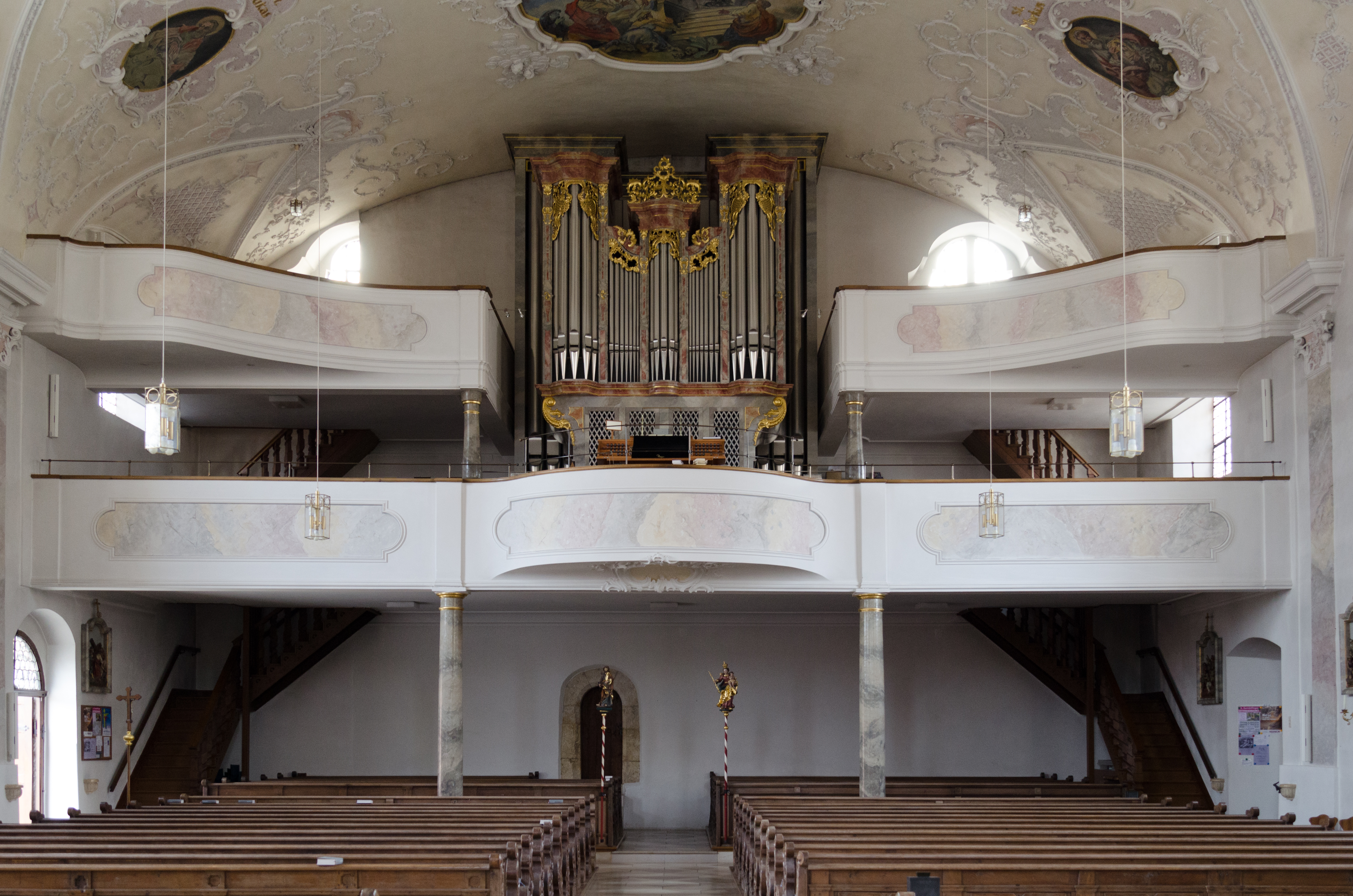 Gundelfingen, Katholische Stadtpfarrkirche St. Martin